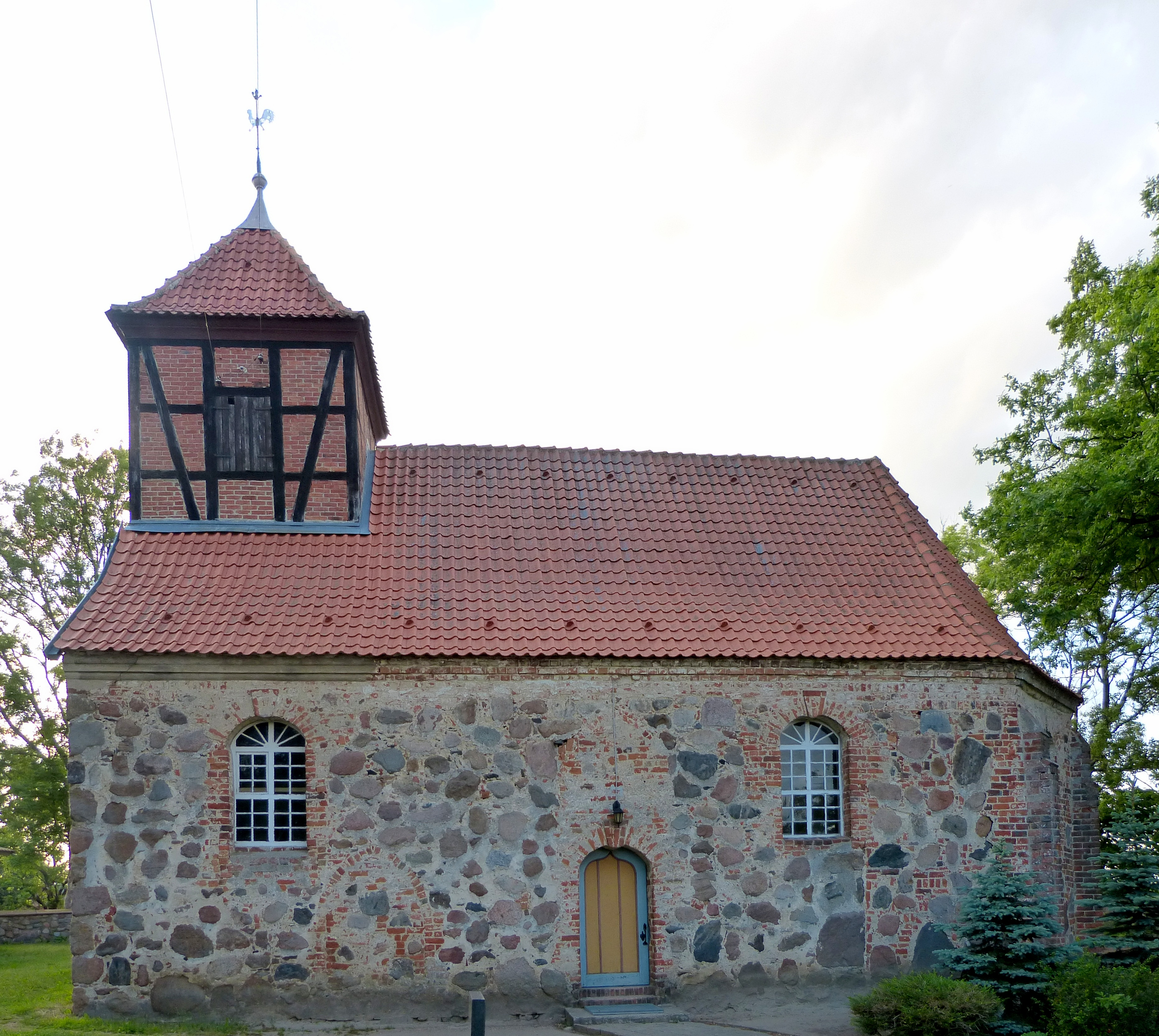 Kirche in Pripsleben, Südseite